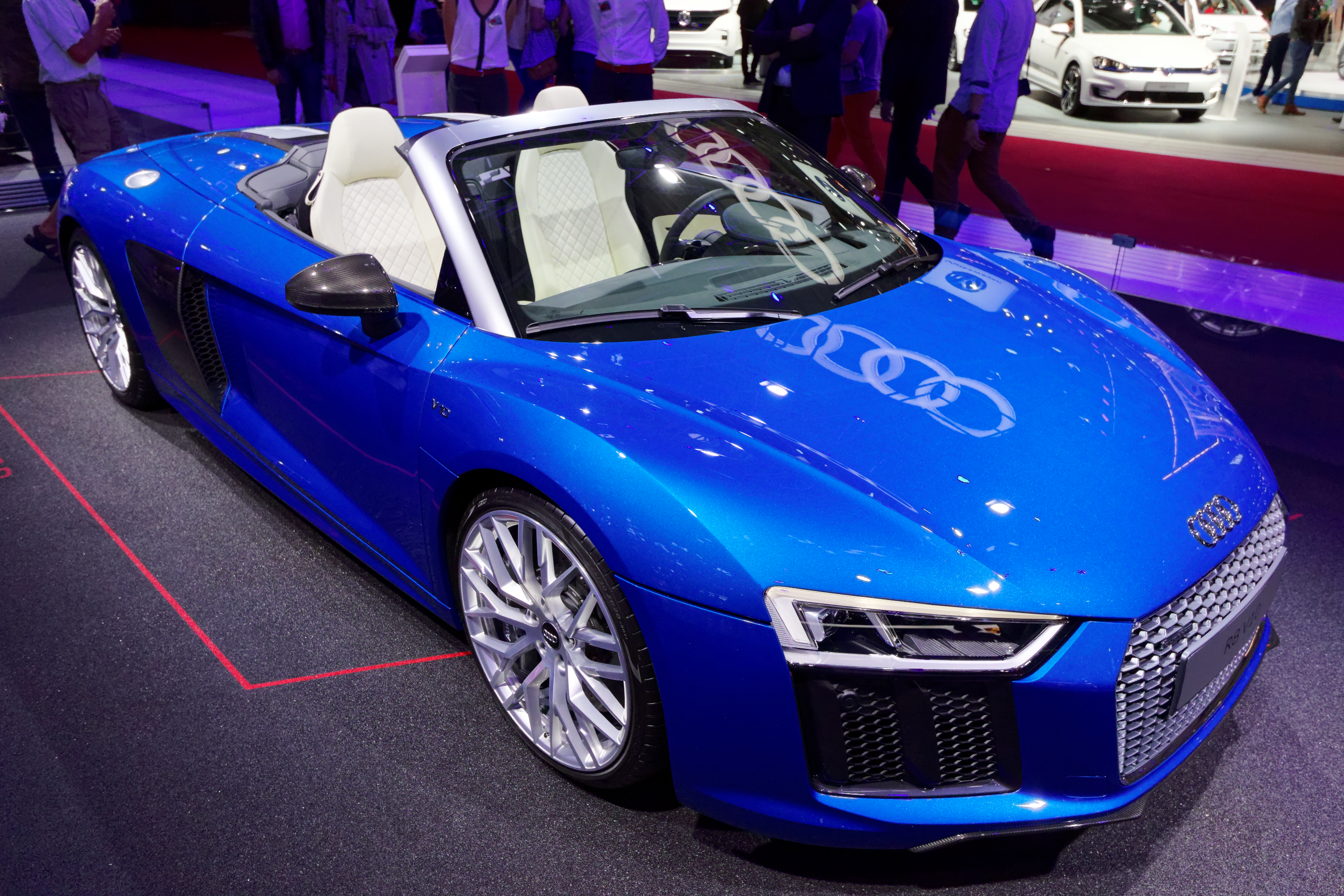 Une Audi R8 Spyder présentée lors du mondial de l'automobile de Paris 2016.